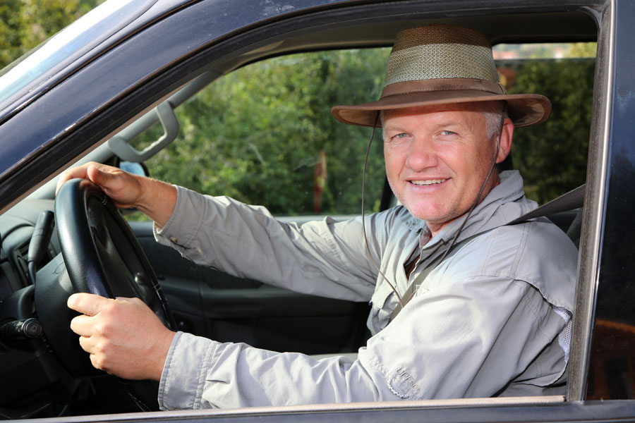 Semir Osmanagić-7637